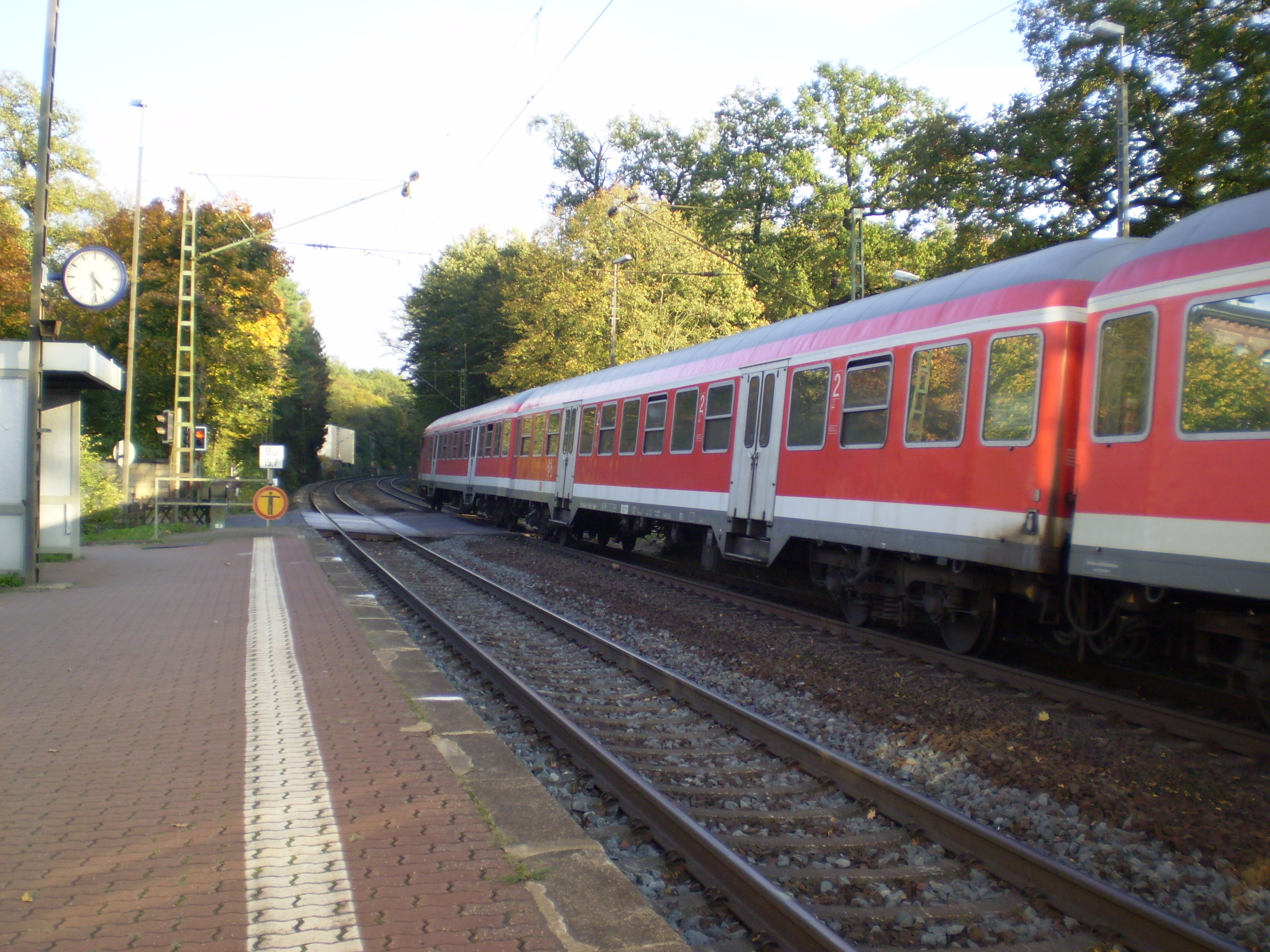 Regionalbahn ausfahrend am Bahnhof Hanau Wilhelmsbad.